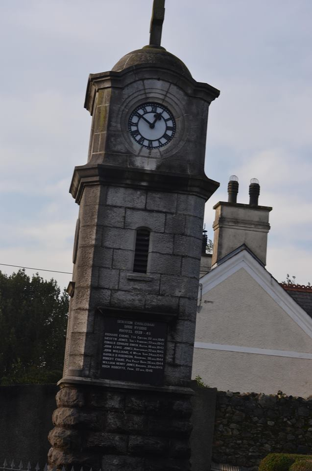 Cofeb ryfel Gwalchmai